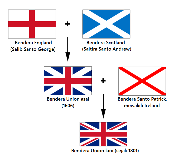 Development of the Union Jack, translated into Malay. Perkembangan bendera Union Jack yang diterjemahkan dari Bahasa Inggeris ke Bahasa Melayu.